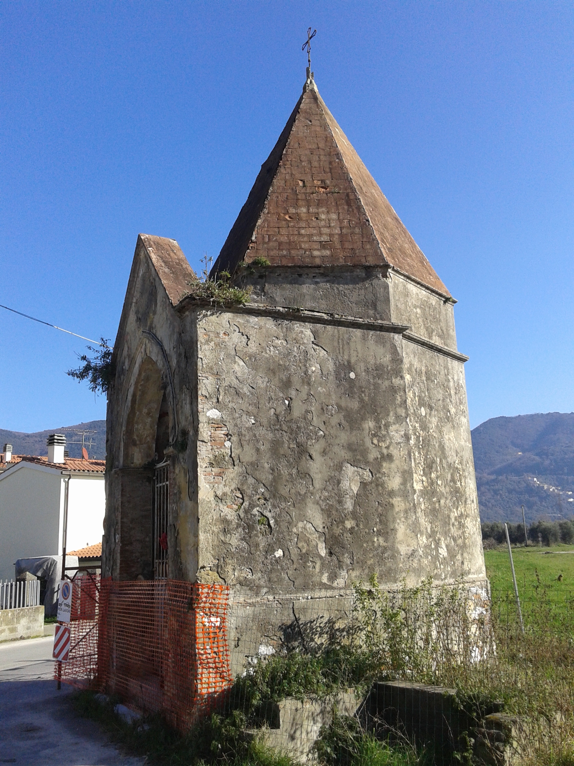 San Giuliano Terme (PI), tabernacolo di Colognole, opera dell'architetto Alessandro Gherardesca, situato nella frazione di Patrignone: in degrado.